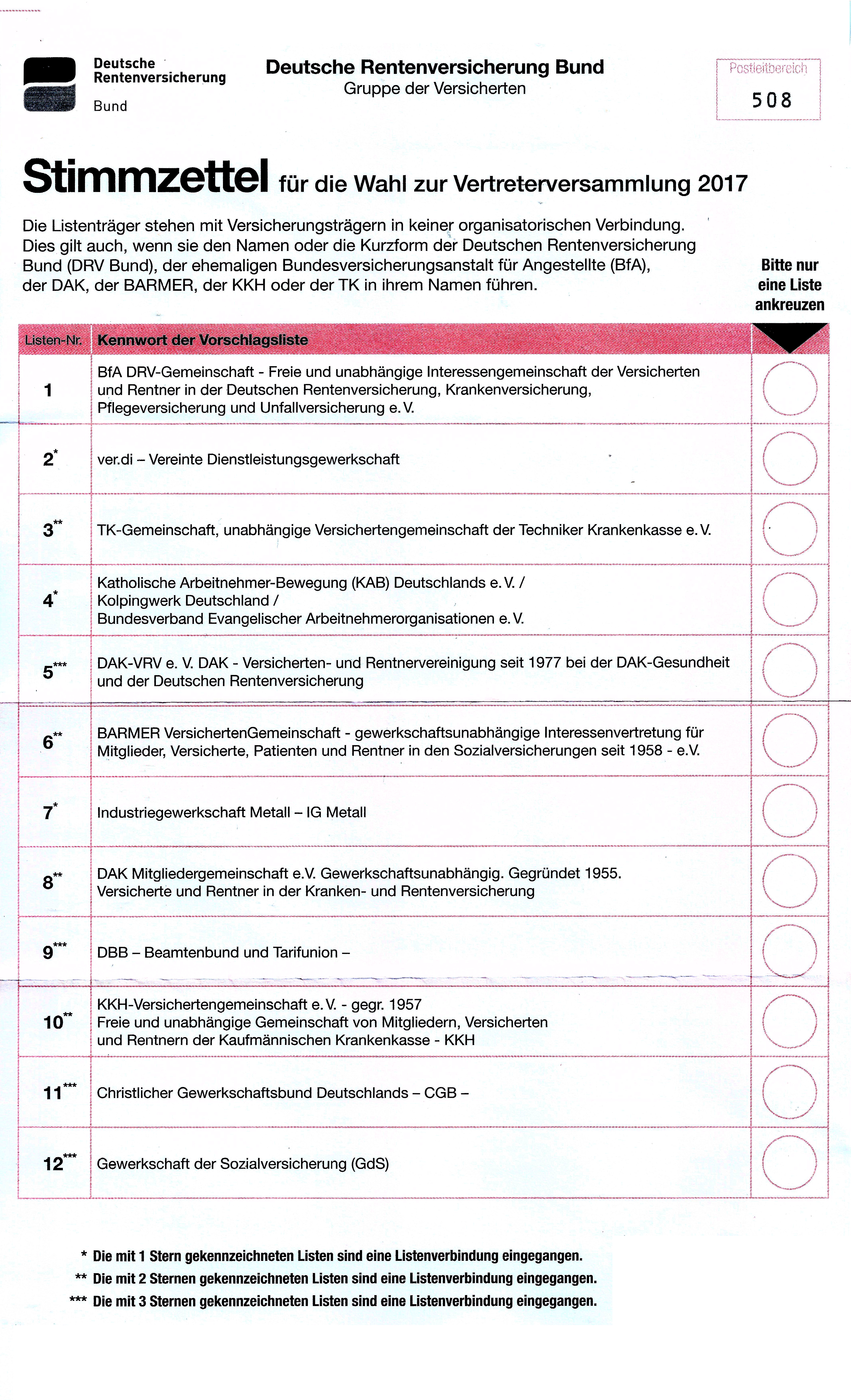 Stimmzettel für die Wahl zur Vertreterversammlung 2017. Deutsche Rentenversicherung Bund